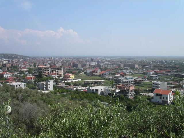 Lushnjë (Albania)